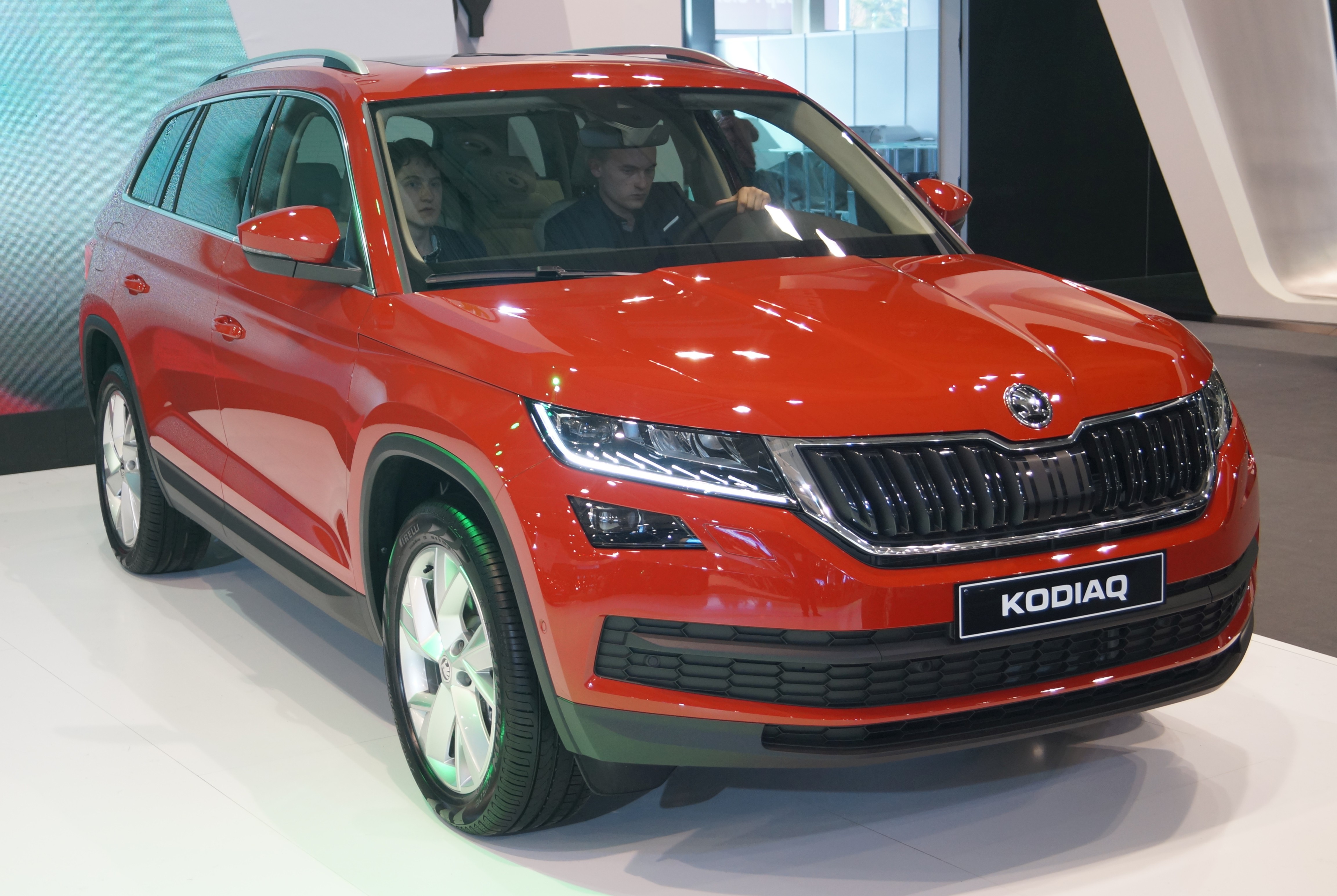 Škoda Kodiaq na Motor Show Poznań 2017.